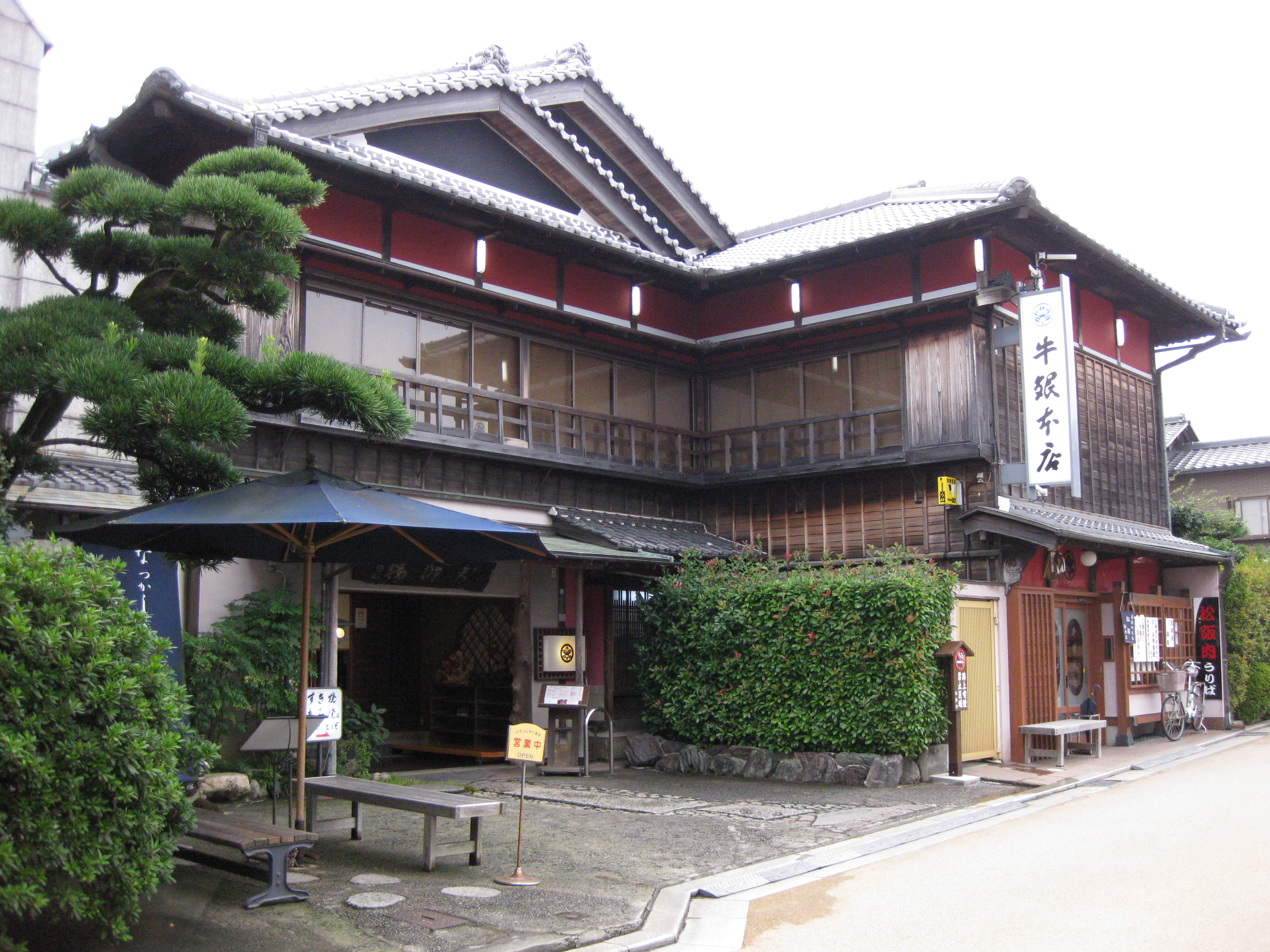 牛銀本店外観